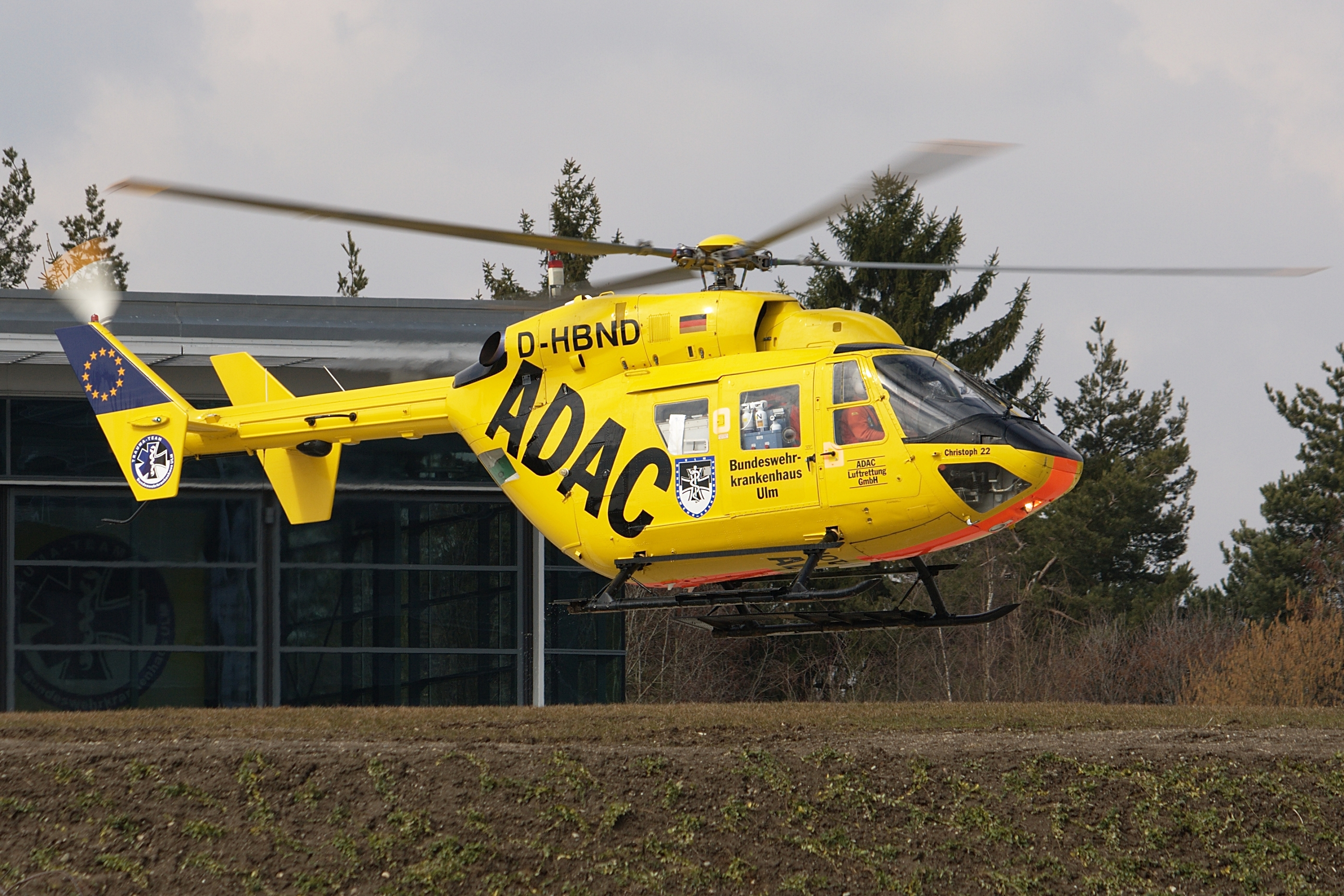 ADAC Eurocopter BK-117 D-HBND Christoph 22 am Bundeswehrkrankenhaus Ulm